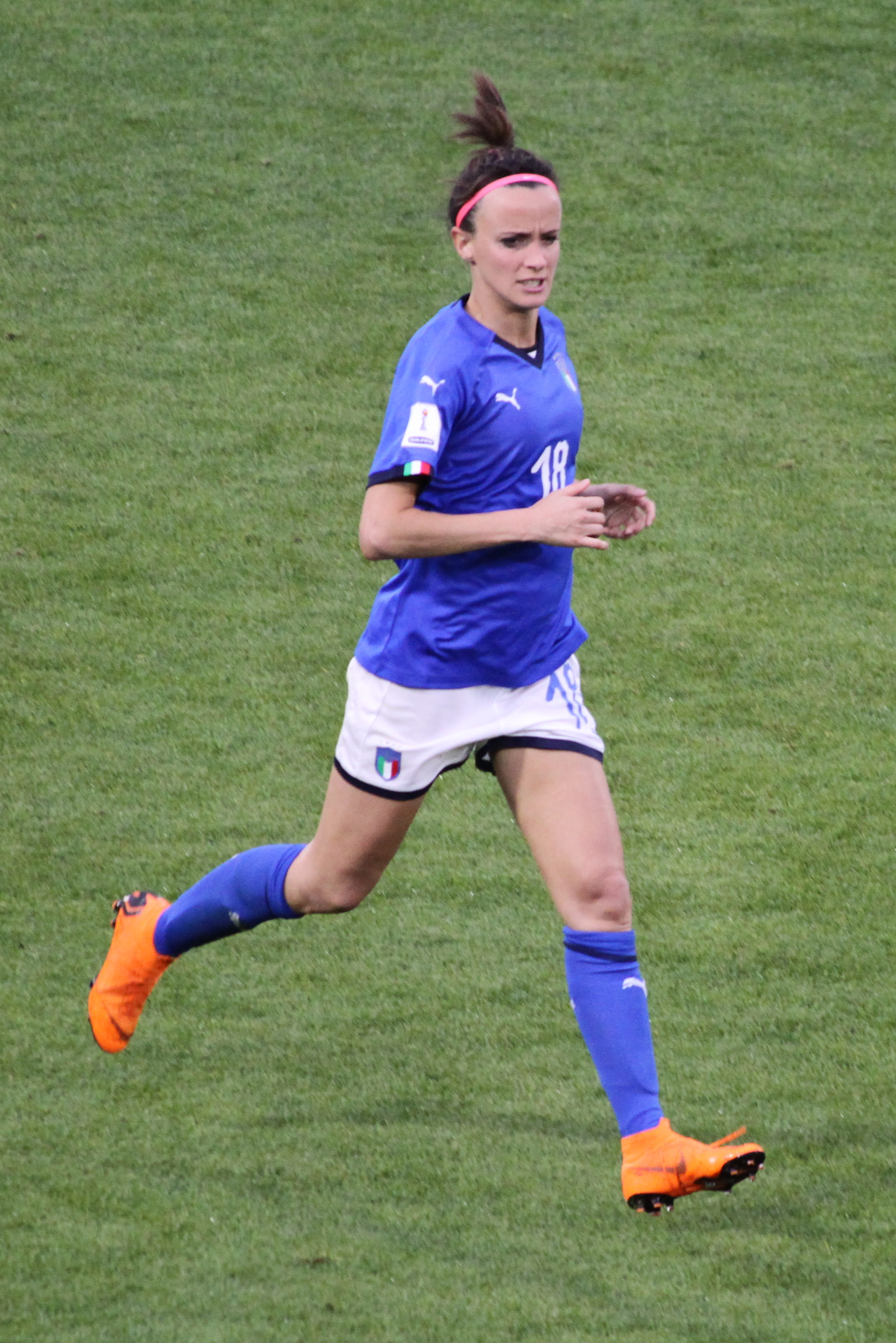 Ferrara, 10 aprile 2018: Italia vs Belgio, qualificazioni al Mondiale di Francia 2019